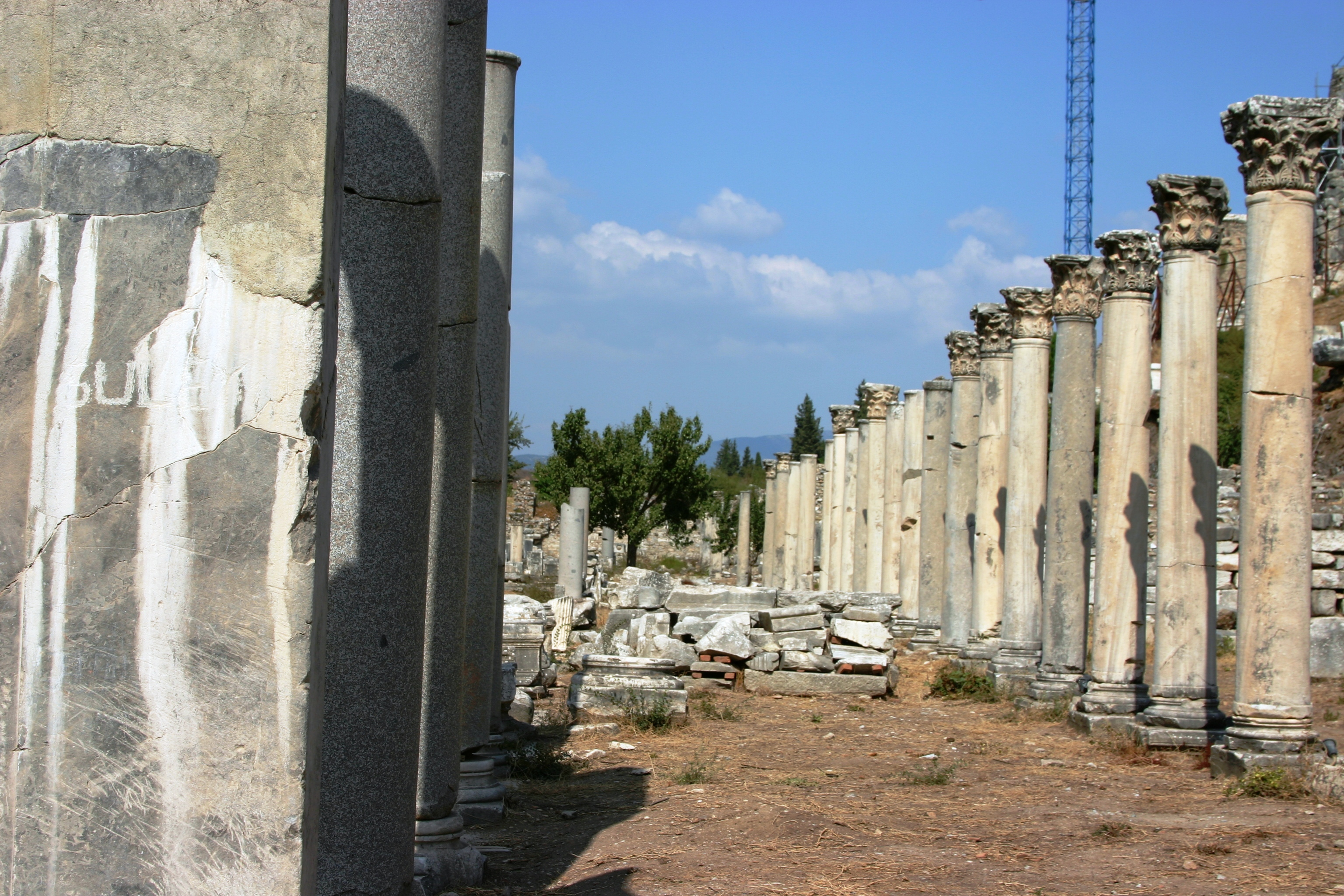 Ágora de Éfeso